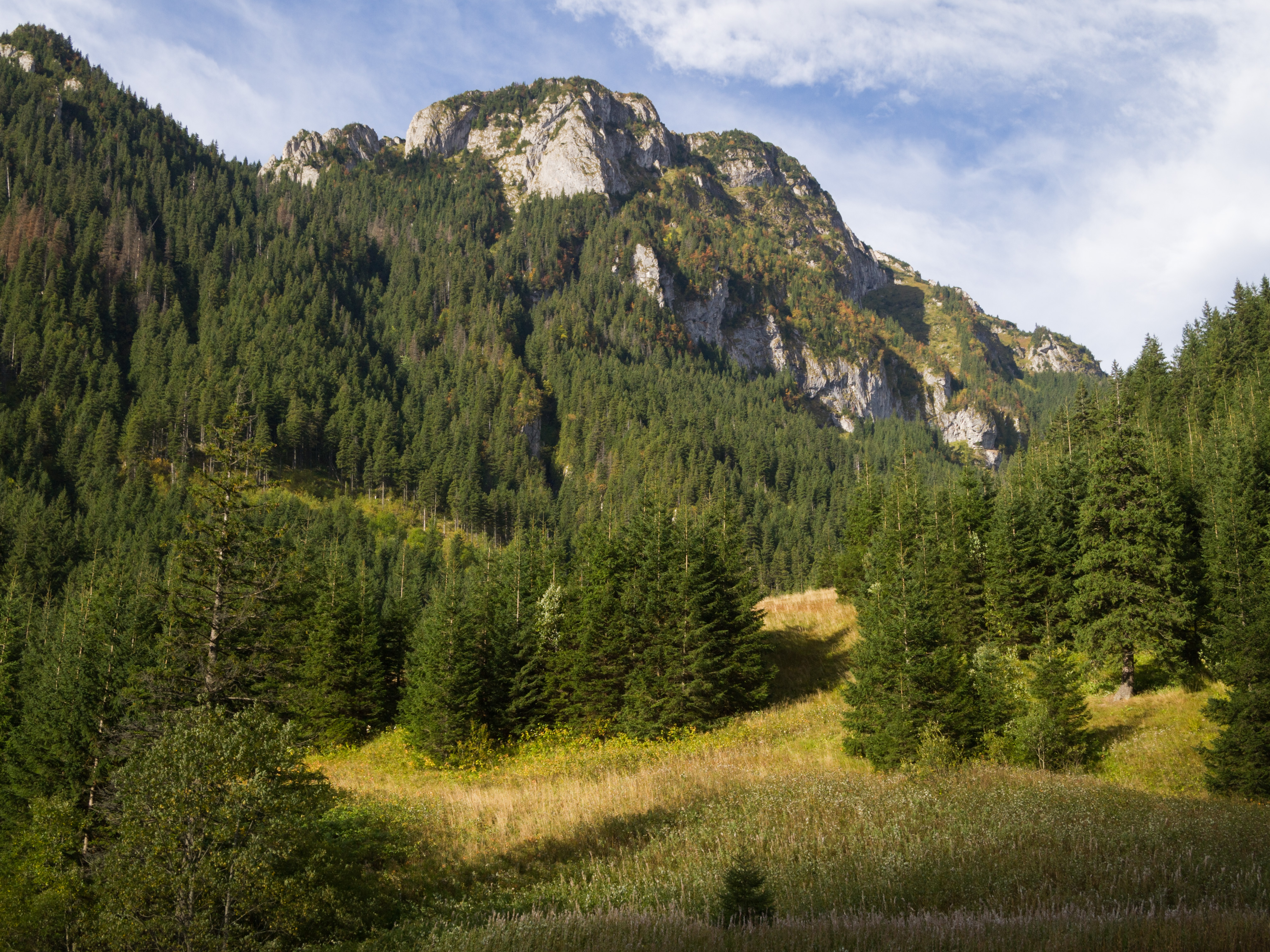 Widok na Raptawicki (Żeleźniakowy) Wierch z Polany Pisanej.